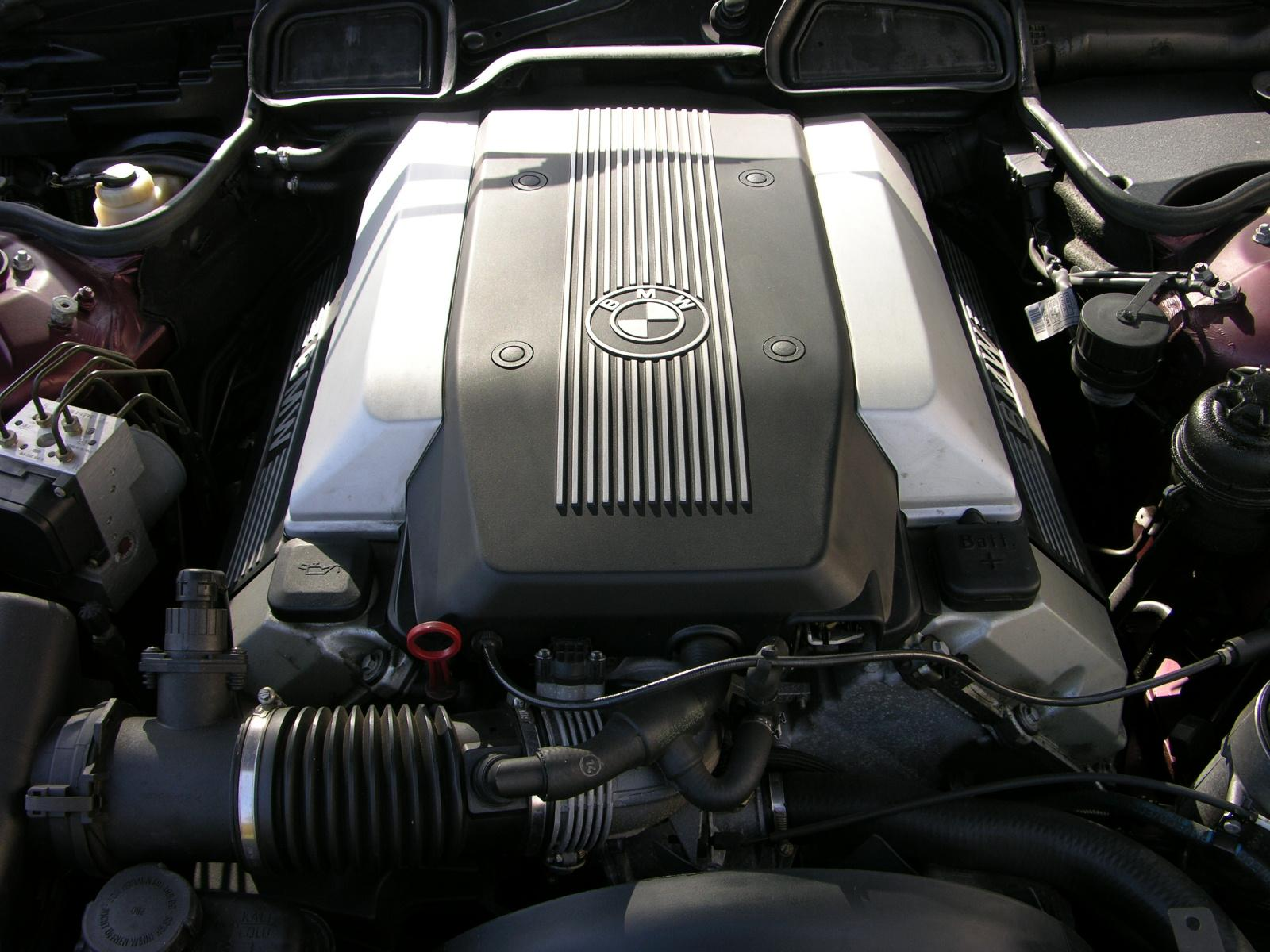 1998 BMW 740i Individual